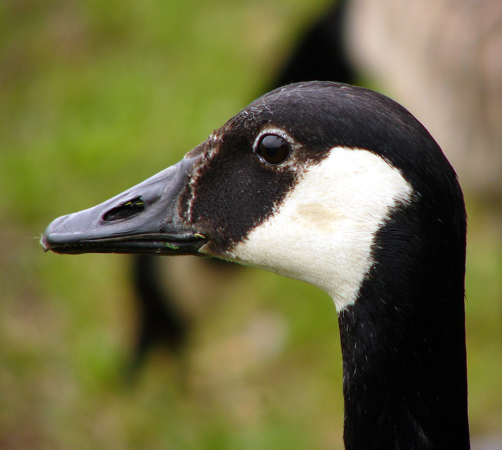 Branta canadensis Canada Goose